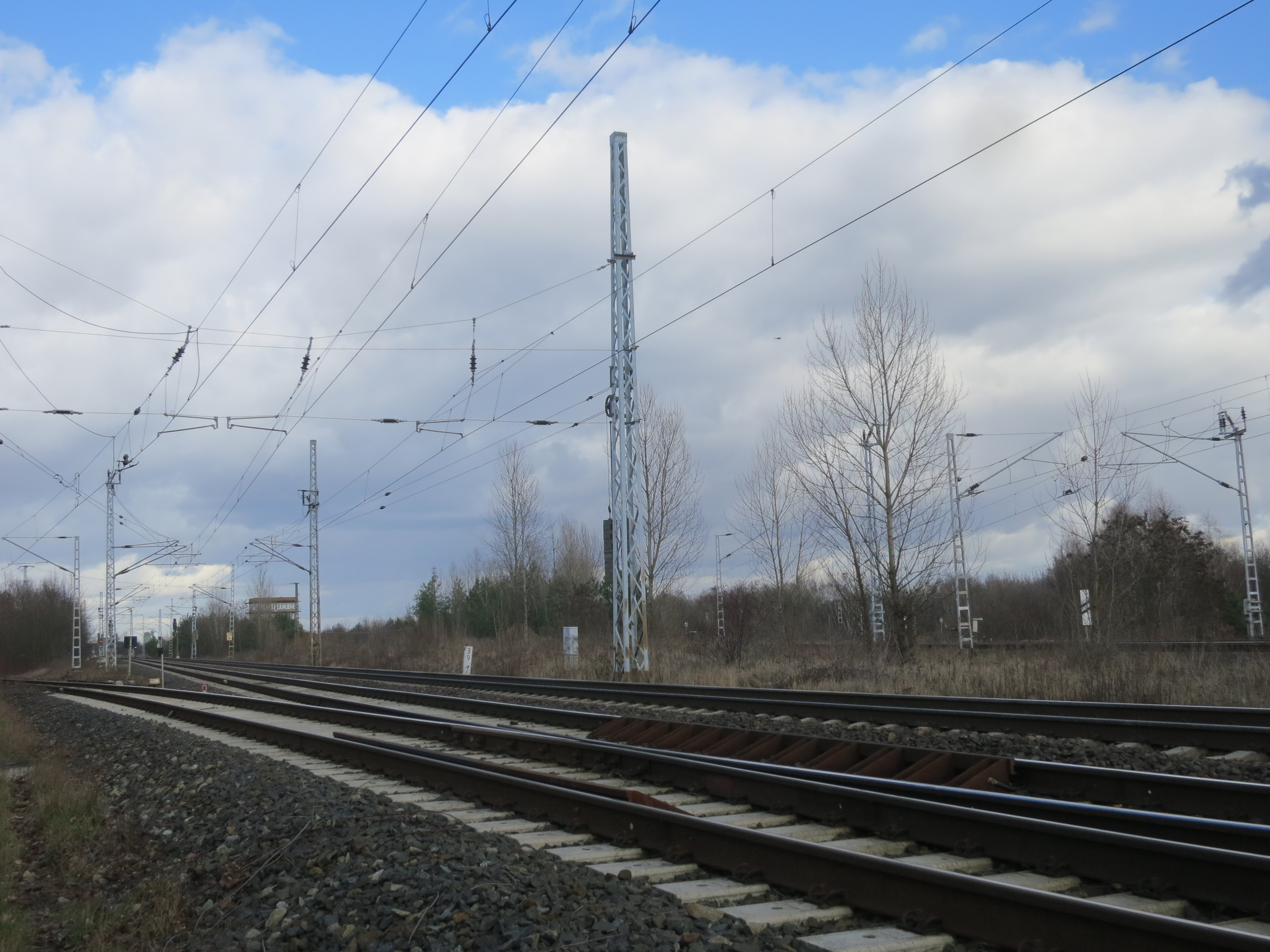 Abzweig Grünauer Kreuz Süd am Berliner Außenring. Von links nach rechts: Verbindung von der Görlitzer Bahn aus Berlin, Berliner Außenring, Verbindung zur Görlitzer Bahn nach Berlin und nach Berlin-Grünau